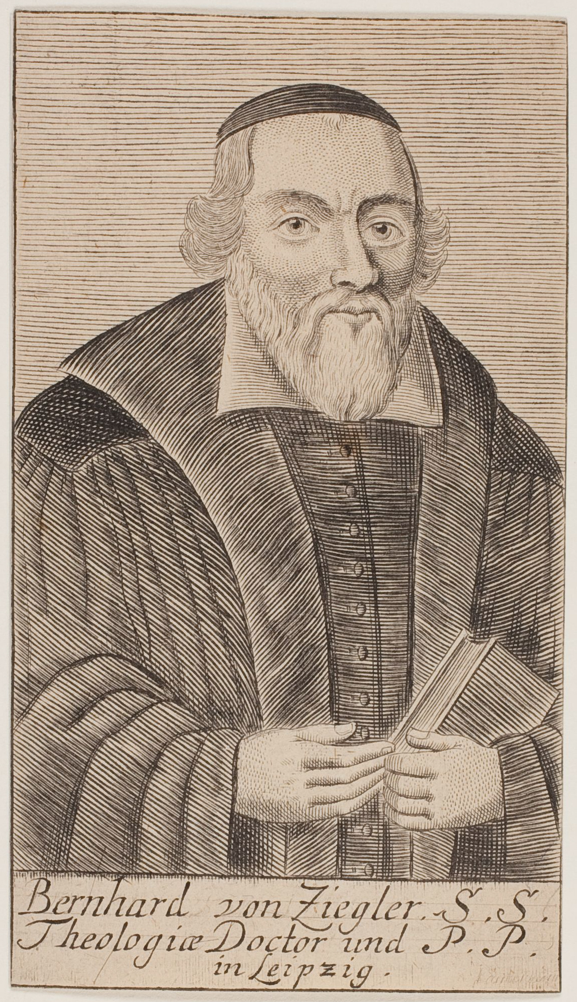 Bildnis Bernhard Ziegler (1496-1556) Kupferstich, 138 x 78 mm Wolfenbüttel, Herzog-August-Bibliothek, Inventar-Nr. A 24791